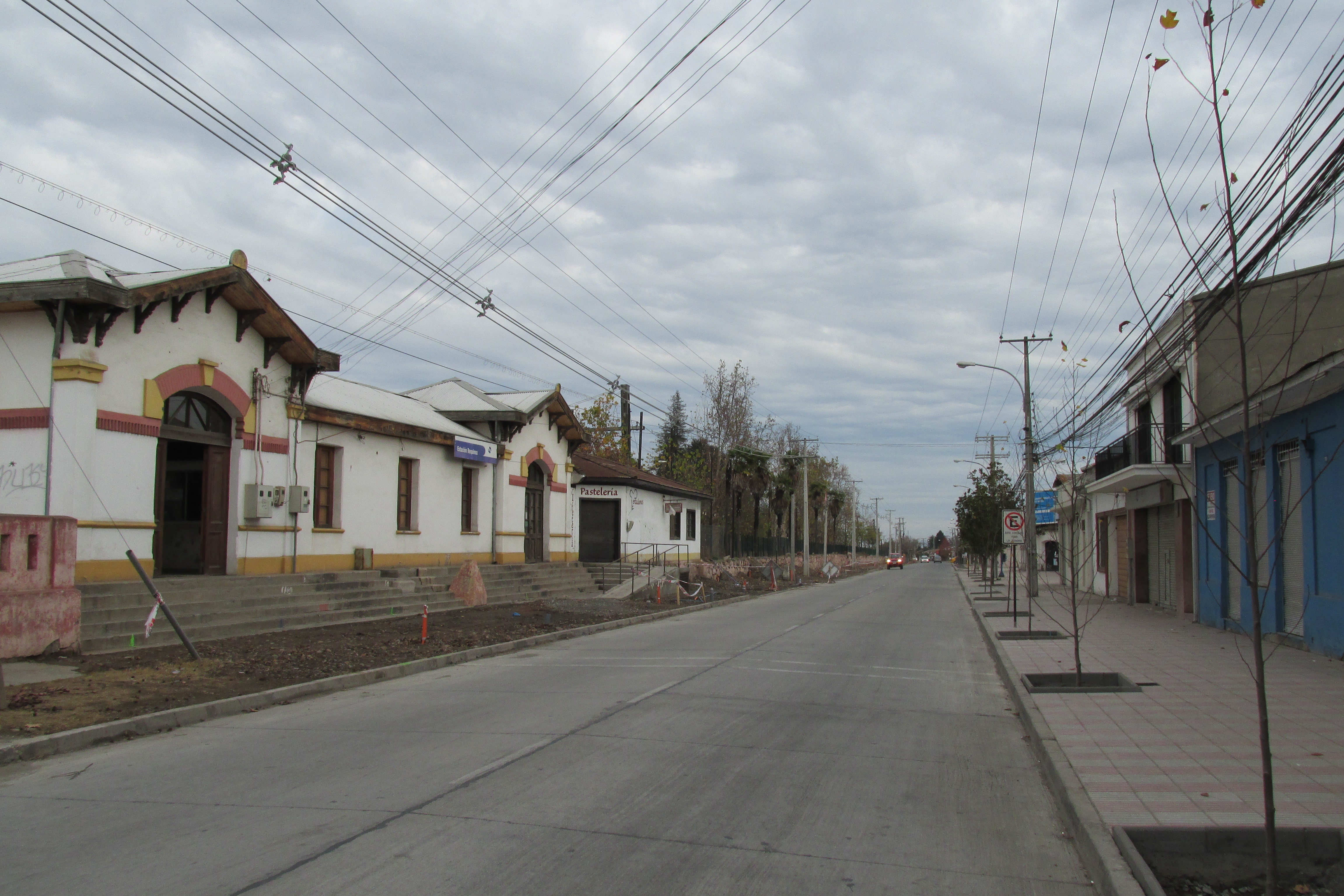 Calle Comercio, una de las principales arterias de la comuna de Requinoa